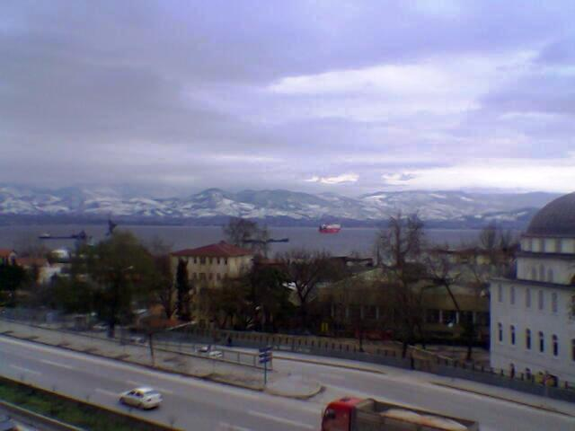 İzmit..TURKEY